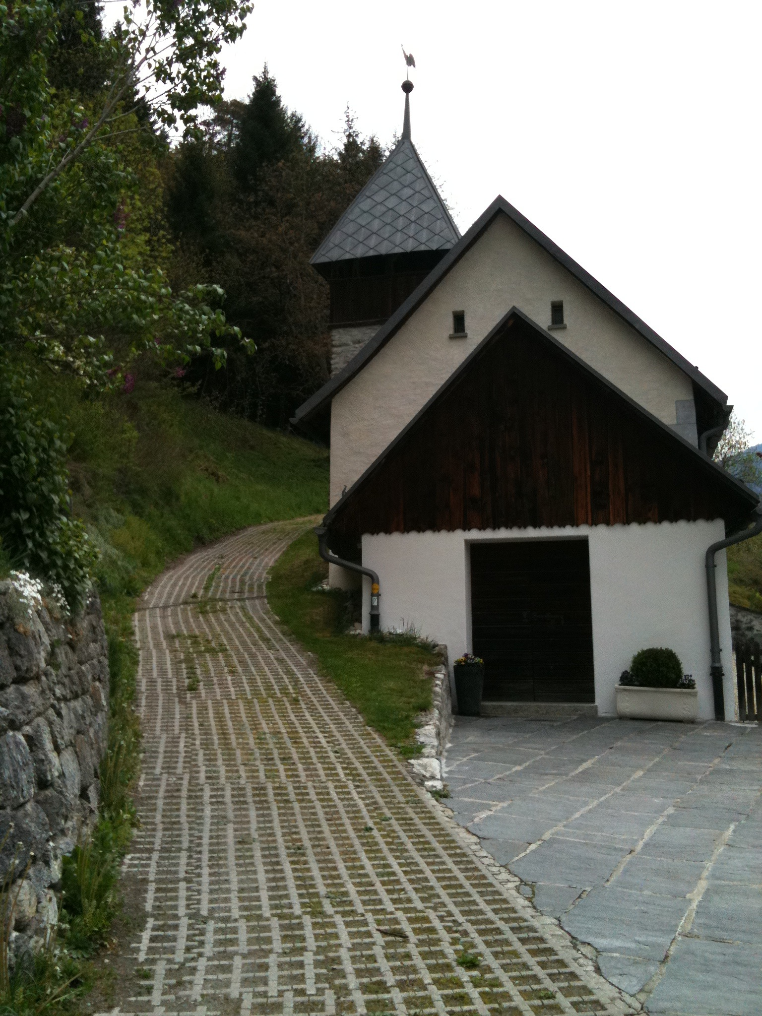 reformierte Kirche Schnaus, Kanton Graubünden